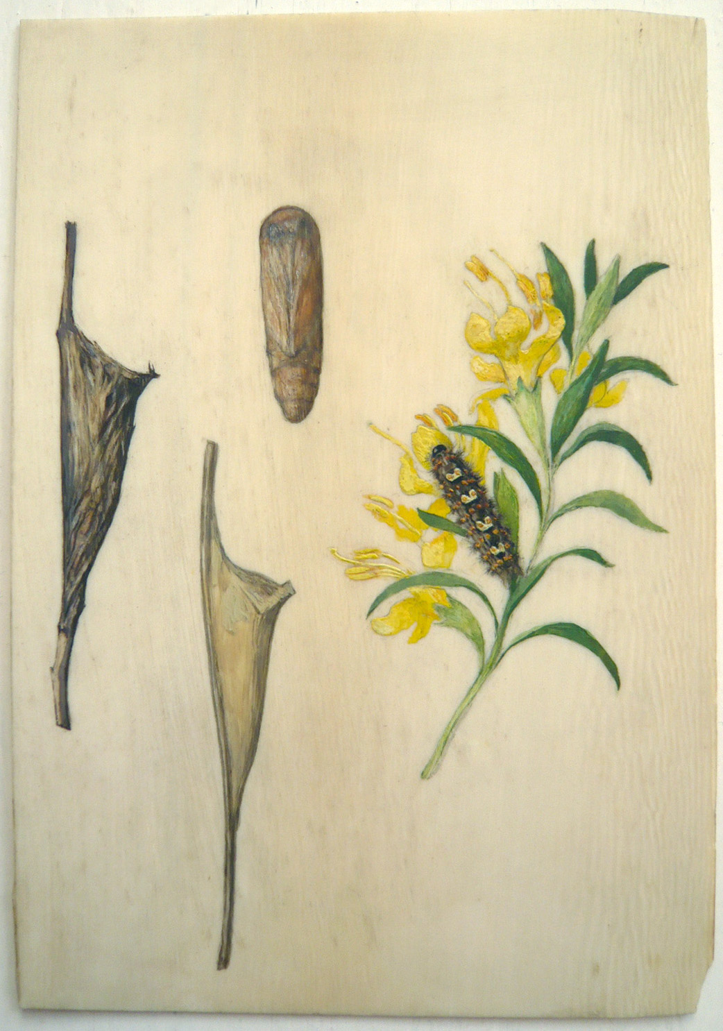 Entomologische (Lepidopterologie) Studie gemalt auf Elfenbein-Platte